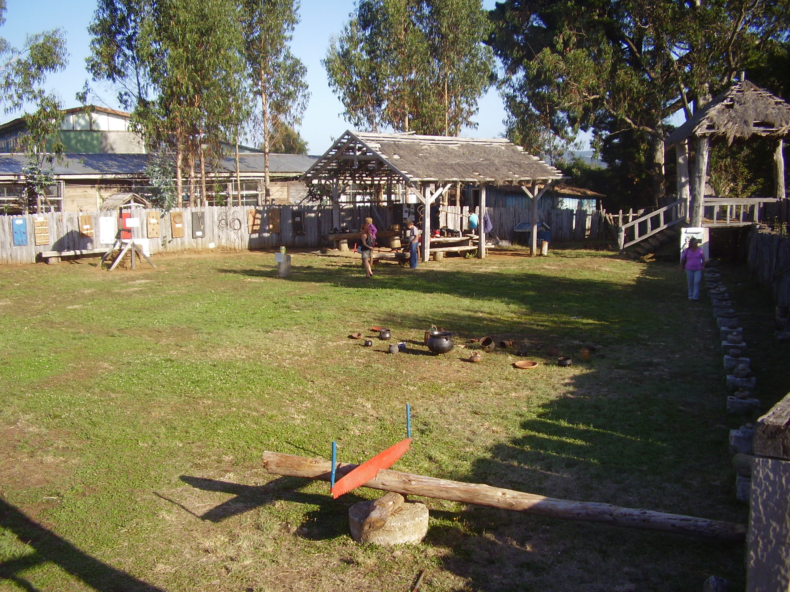 Fuerte Tucapel en la actualidad. La construcción original fue destruida en 1723. Ésta es una reconstrucción que no es la de la época.